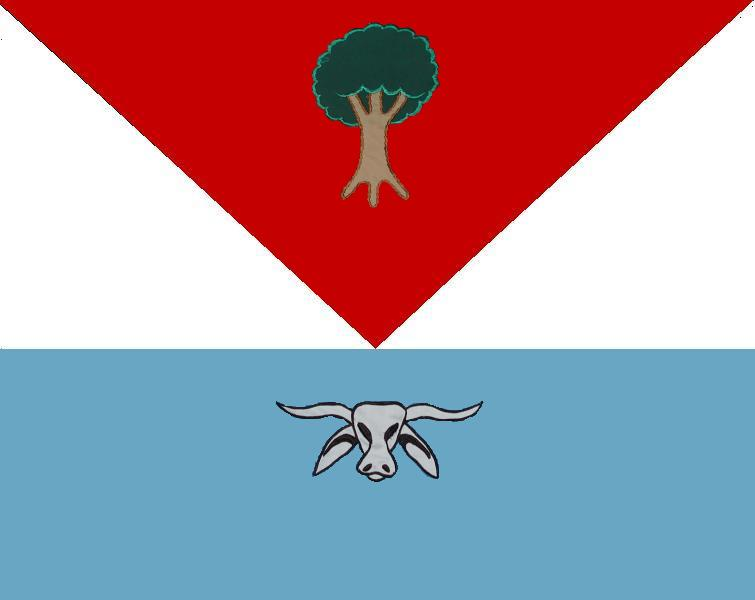 Esta é a bandeira do município de Caatiba, cidade do sudoeste da Bahia.